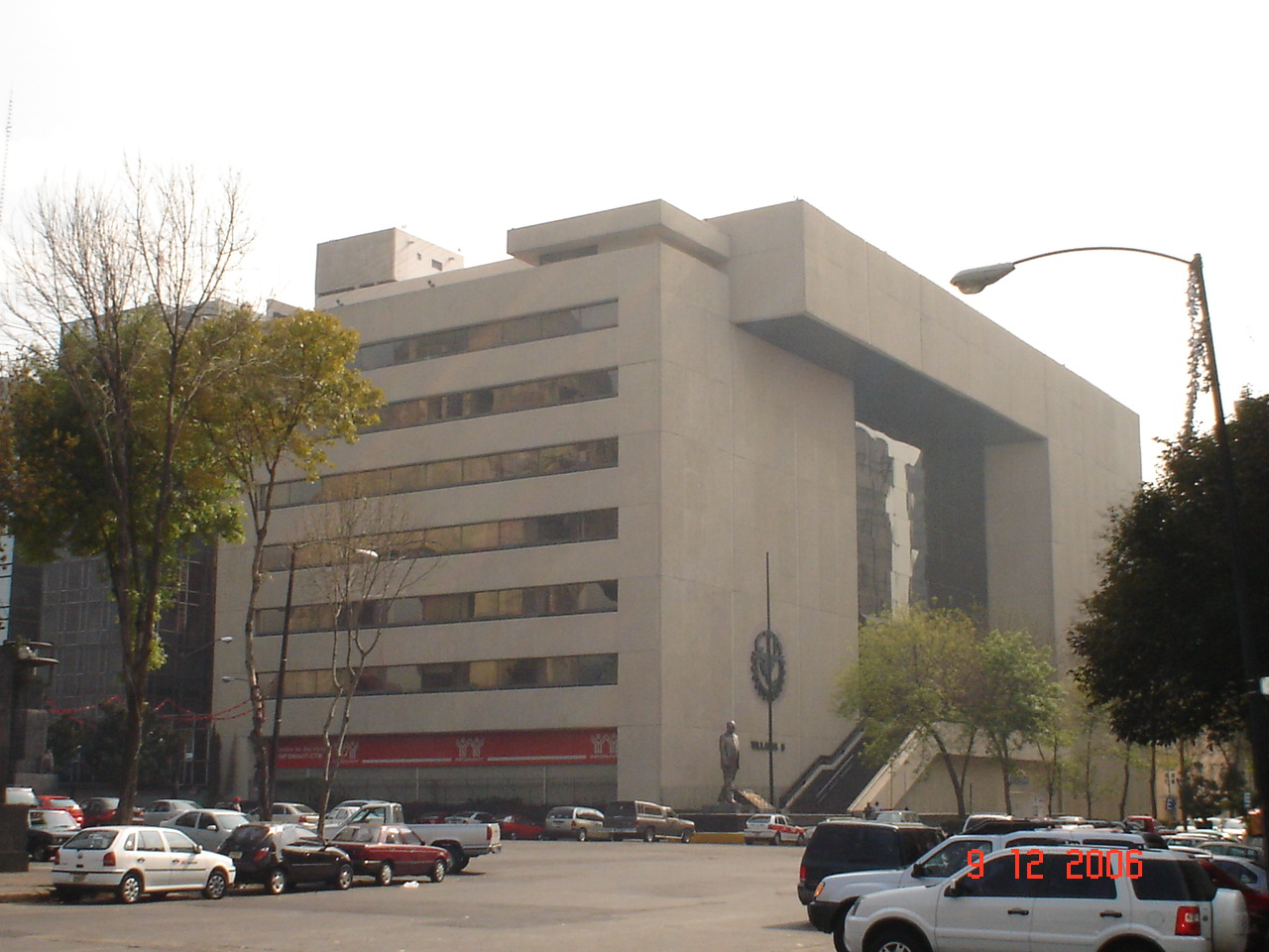 Oficinas centrales de la Confederacion de Trabajadores de Mexico.